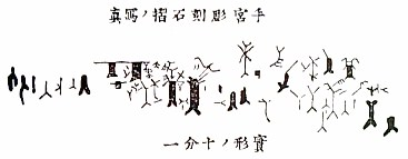 手宮洞窟に刻まれた岩絵